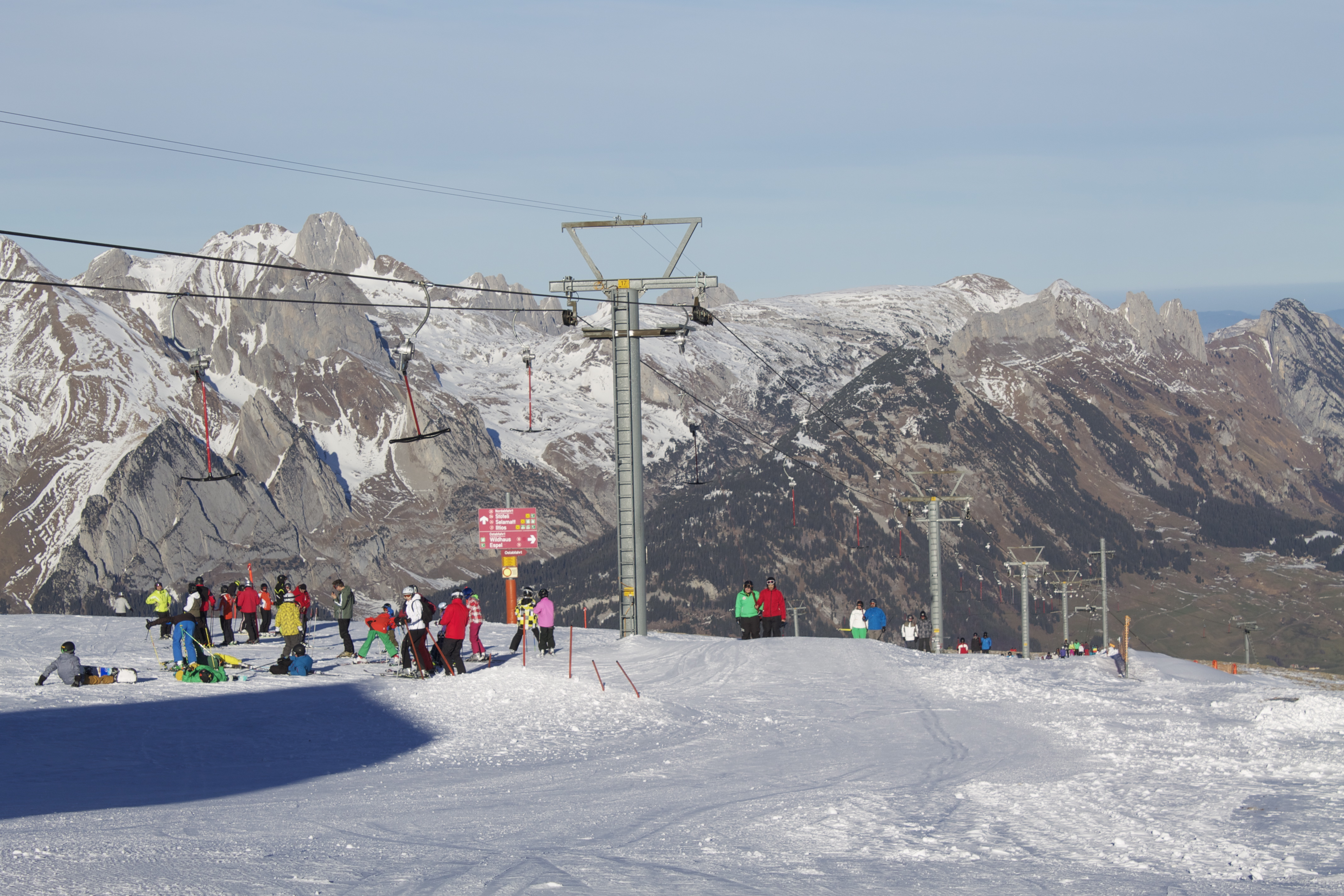 Chäserrugg